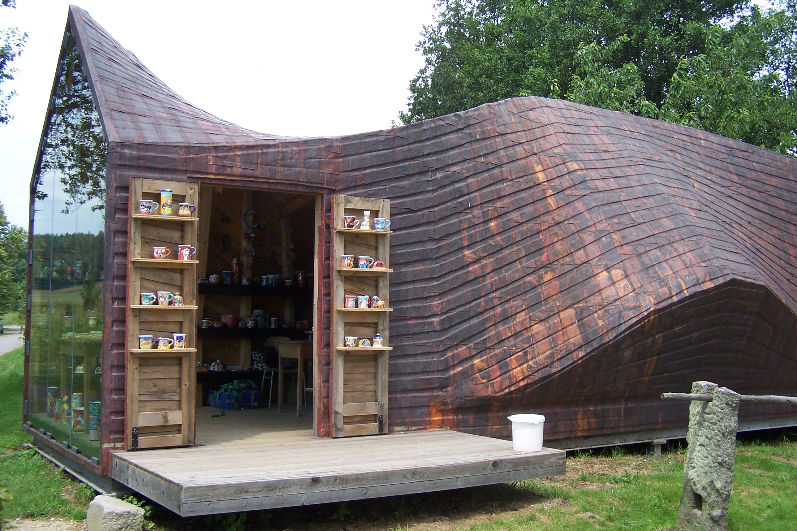 Mařížská keramička